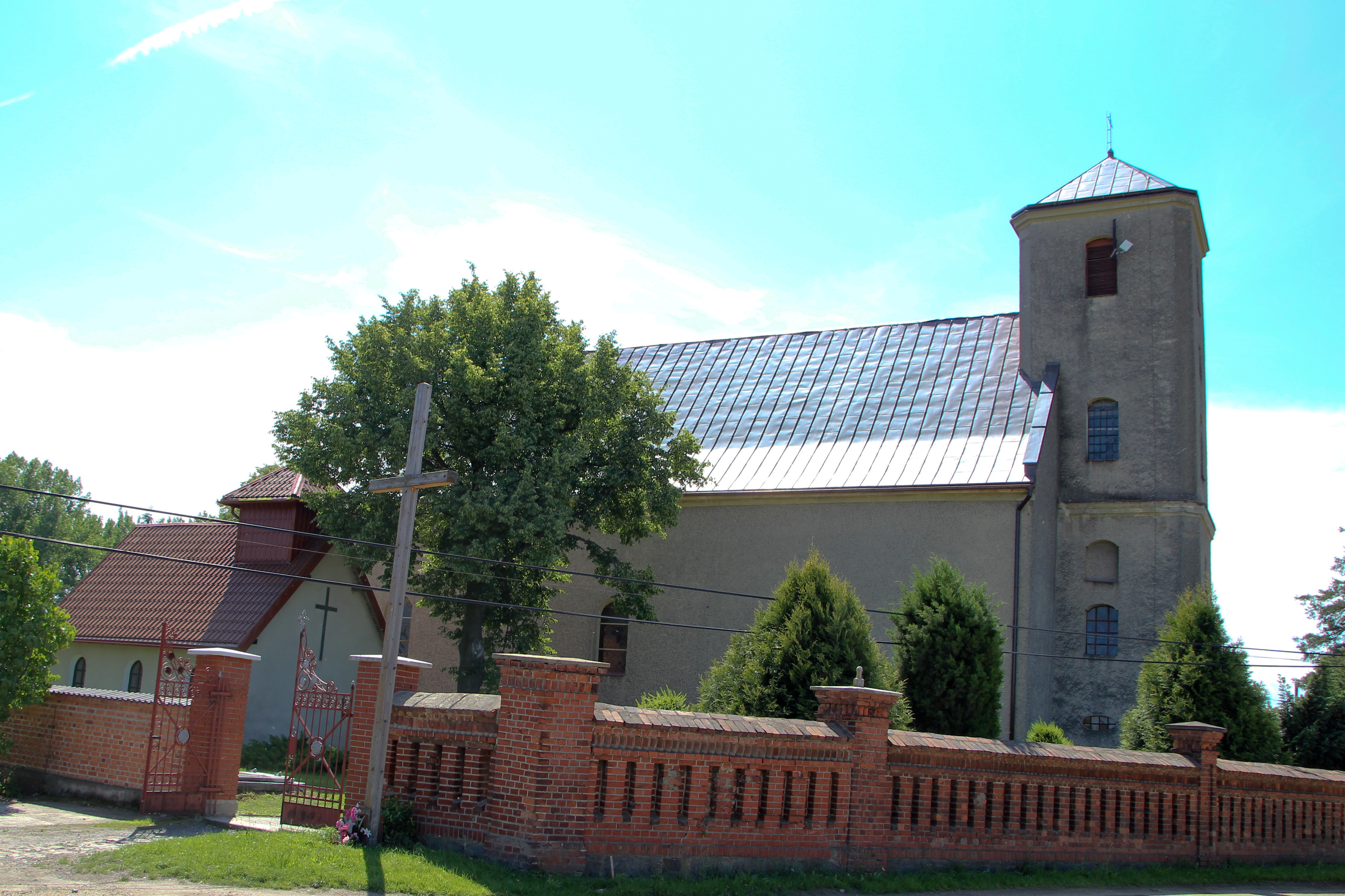 Charbielin 25 - rzymskokatolicki kościół filialny p.w. Ścięcia św. Jana Chrzciciela, 1780, 1958.